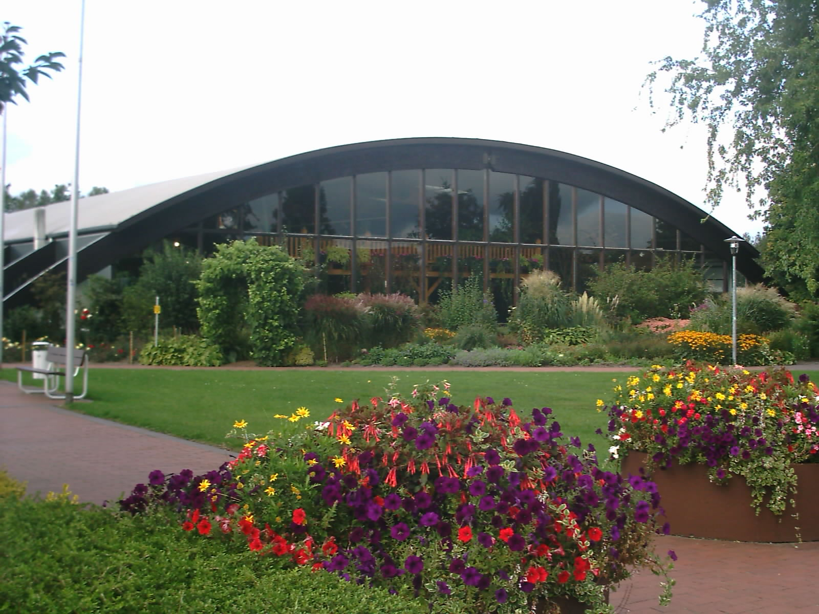 Die Blumenhalle in Wiesmoor